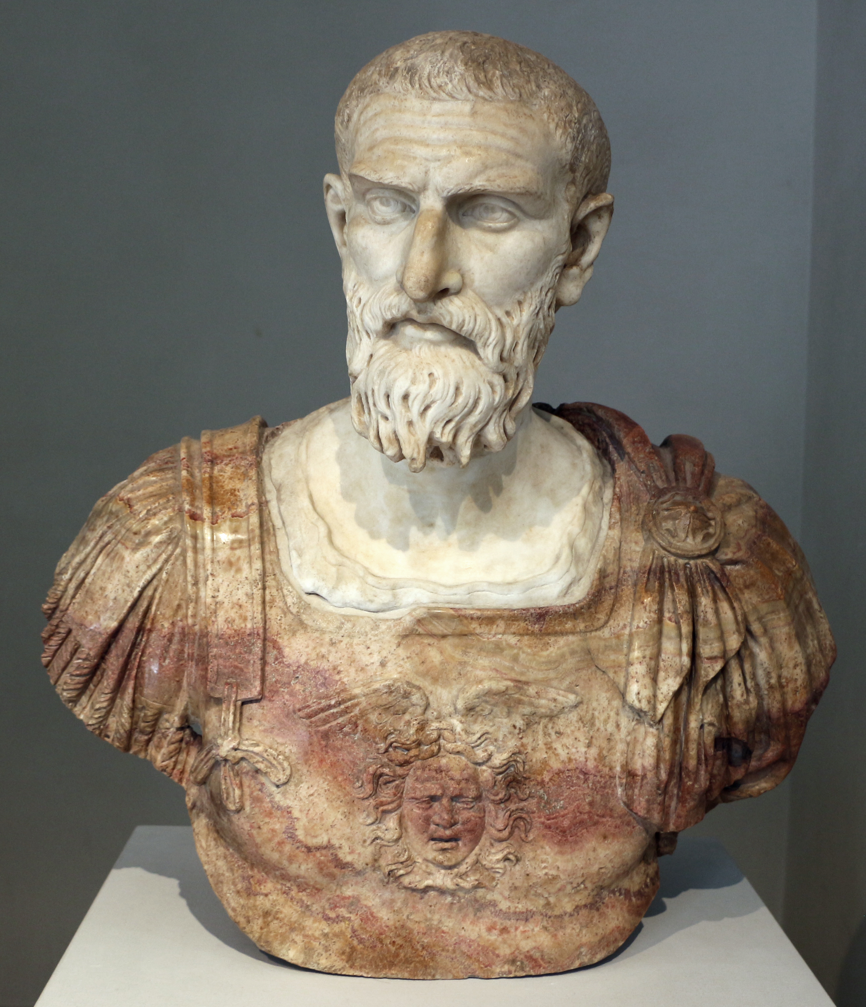 Museo Archeologico Nazionale This is a photo of a monument which is part of cultural heritage of Italy.